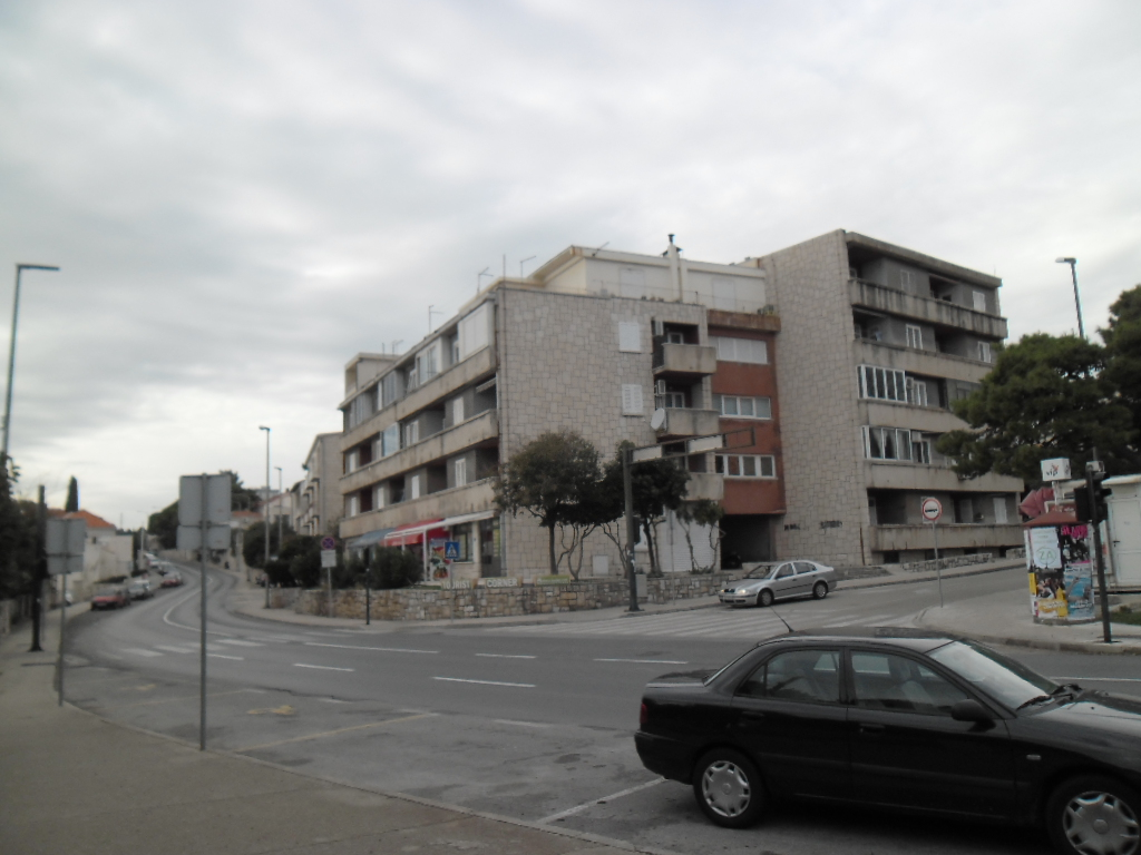 Montovjerna, Dubrovnik